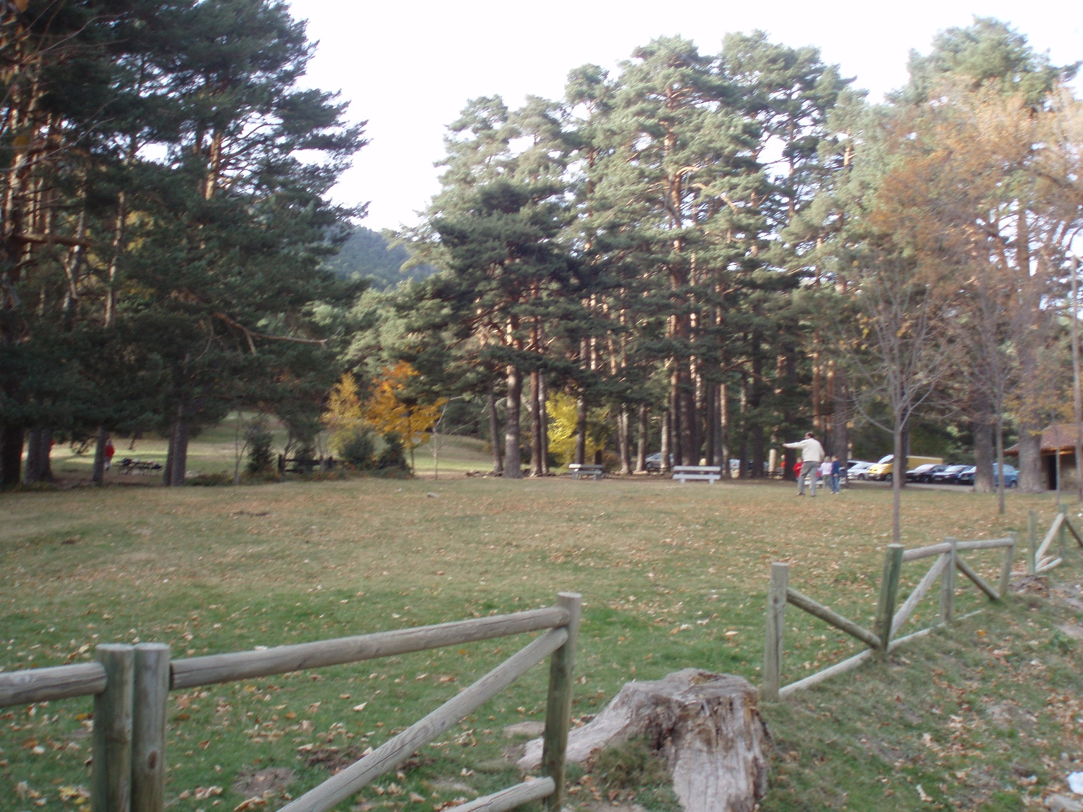 Dehesas de Cercedilla (España).